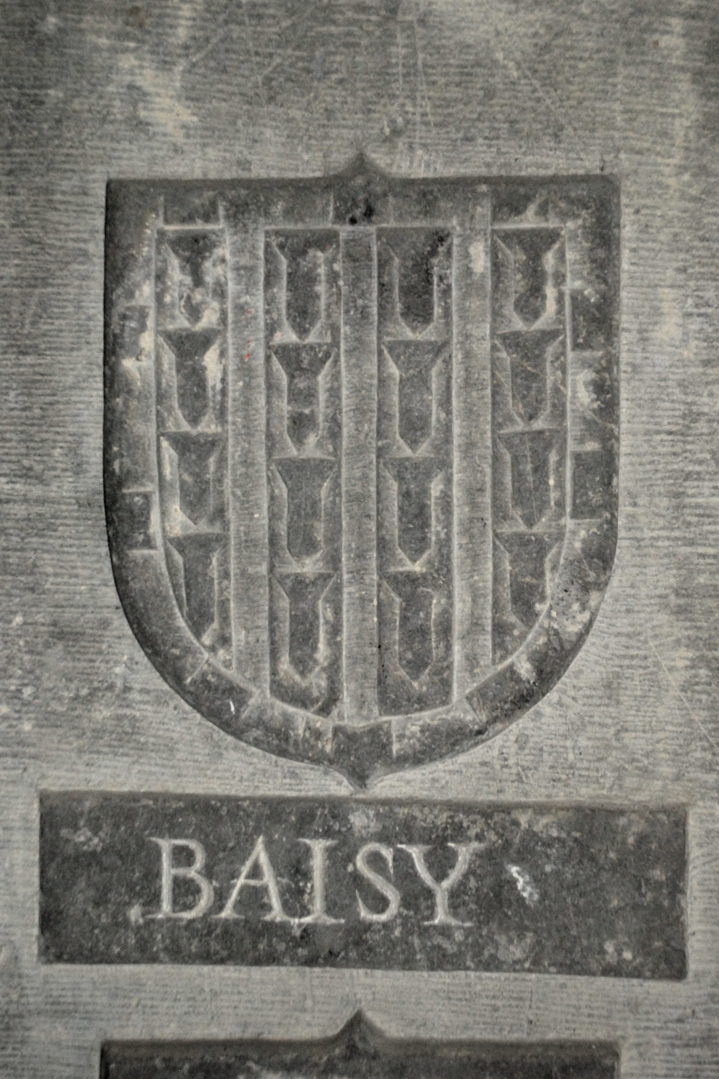 Belgique - Brabant wallon - Ways - Dalle funéraire de Philippe de Baisy